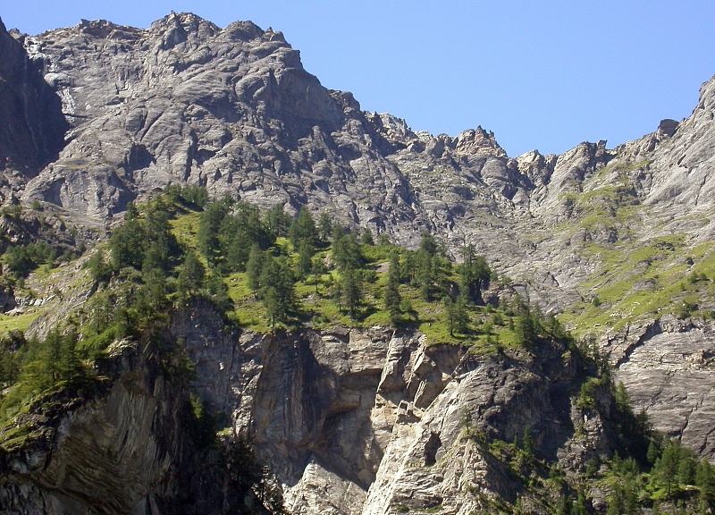 Valle Maggia, Ticino, Switzerland